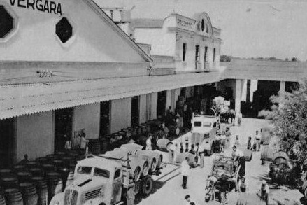 Bodega, Plaza de la Virgen de la Amargura (heute), Jerez de la Fronter